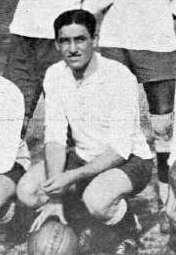 Pedro Cea con la Selección de Uruguay en el Mundial de 1930